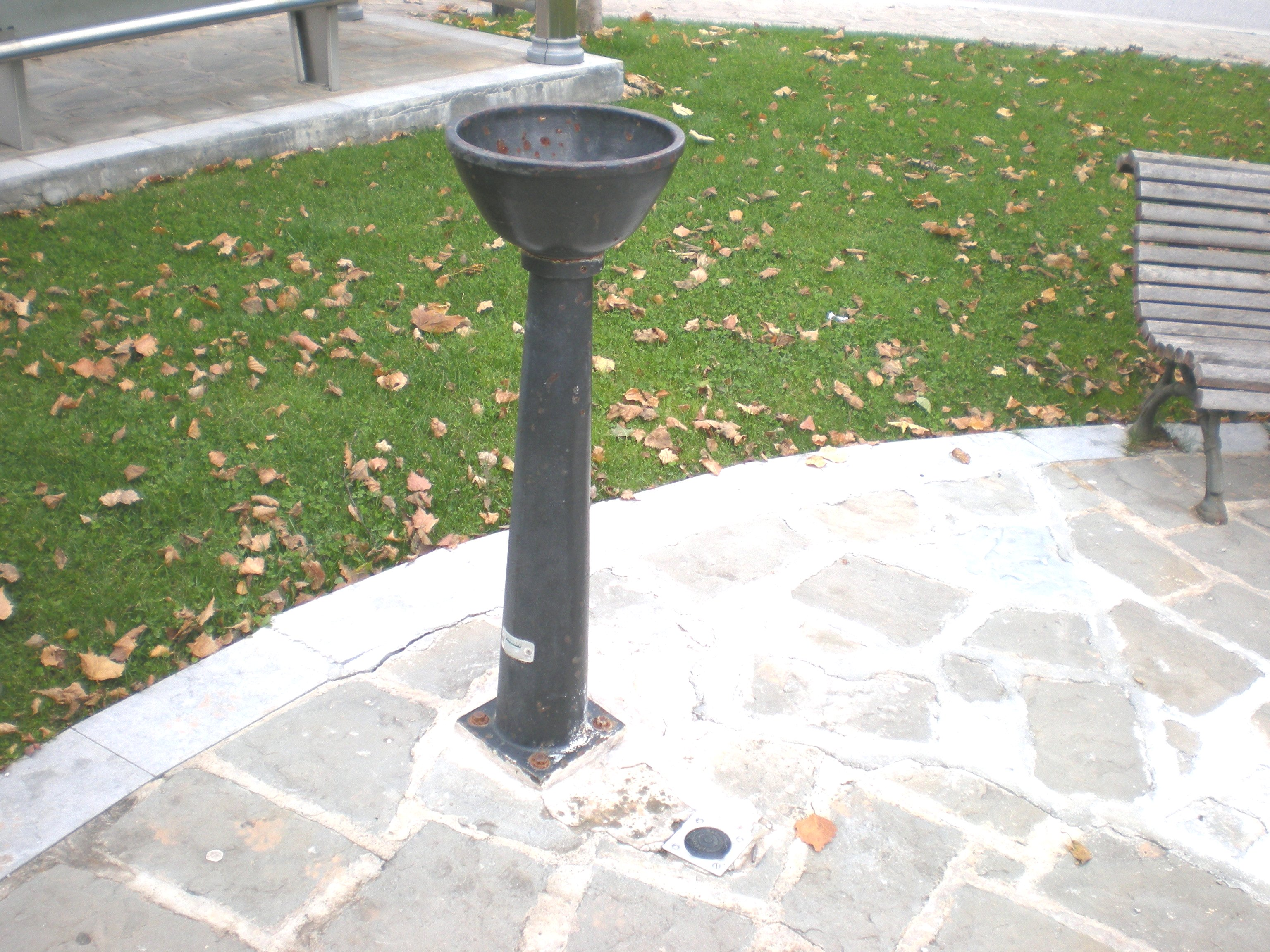 L'altra font de la plaça del Mur, a la vila de Sant Llorenç de Morunys (Solsonès)